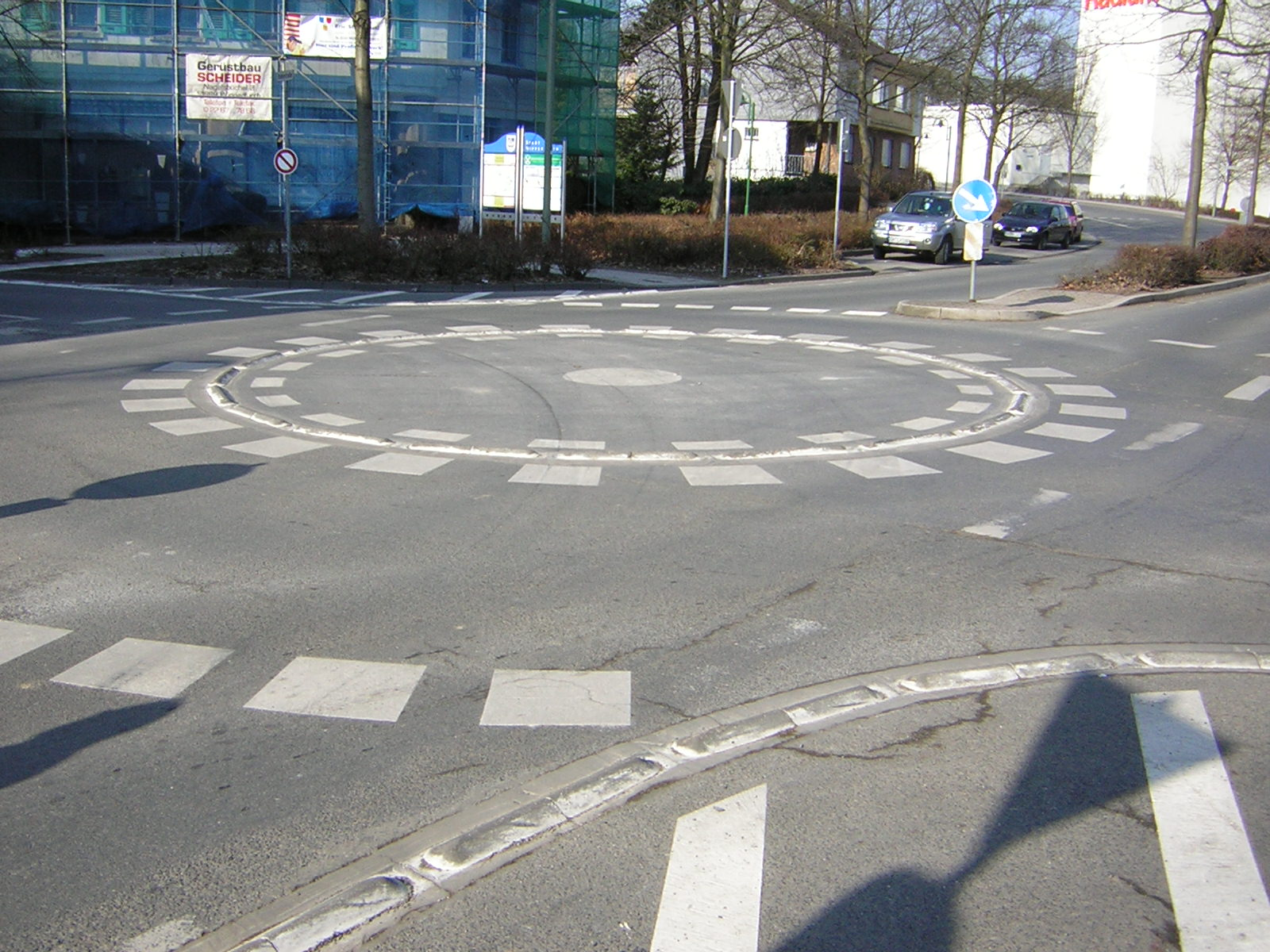 Kreisverkehr in Wipperfürth. Taken with Nikon Coolpix 2200